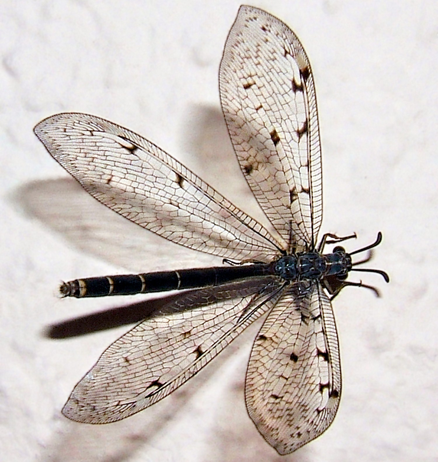 Description Euroleon_nostras